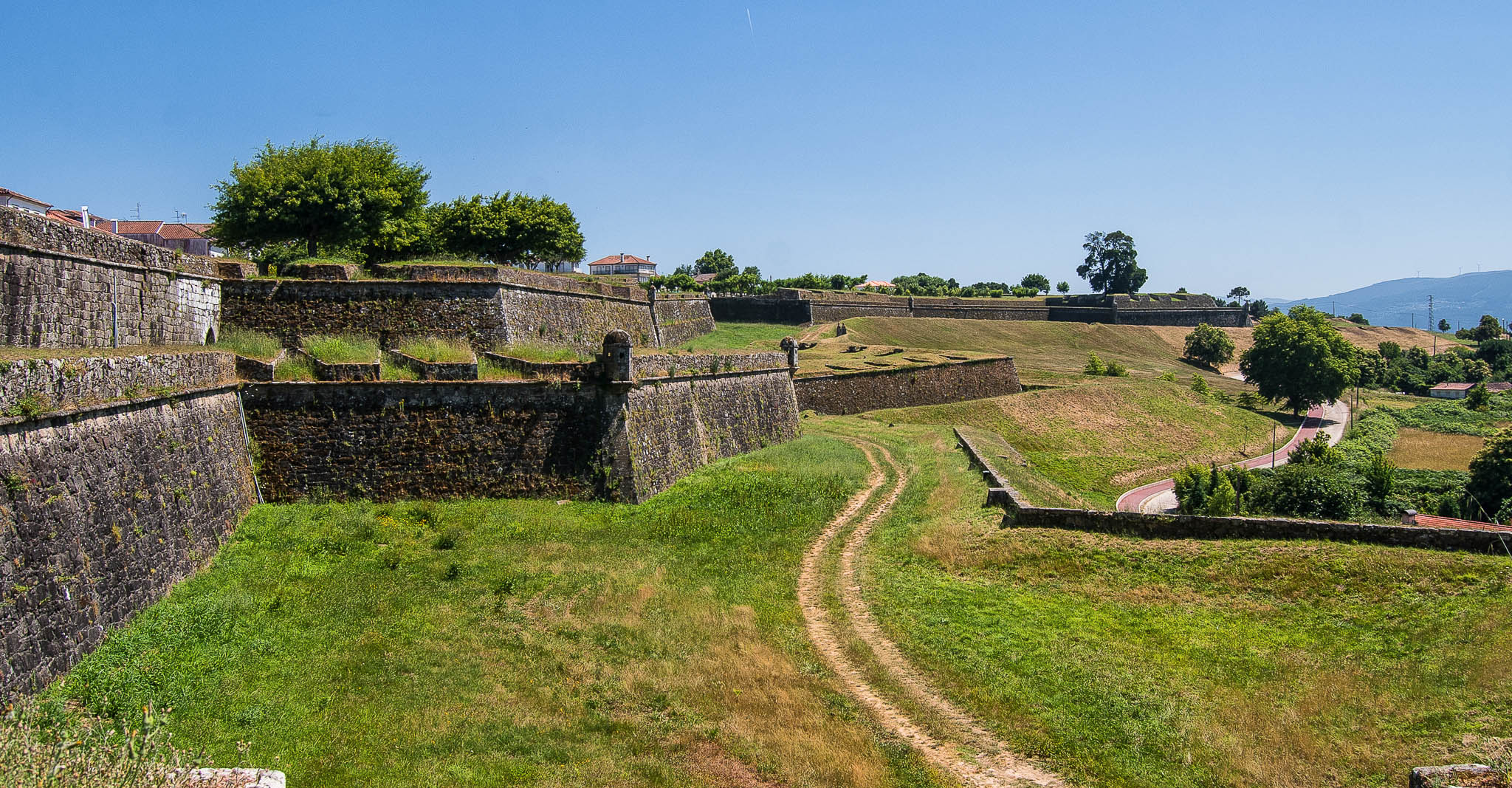 Muralhas